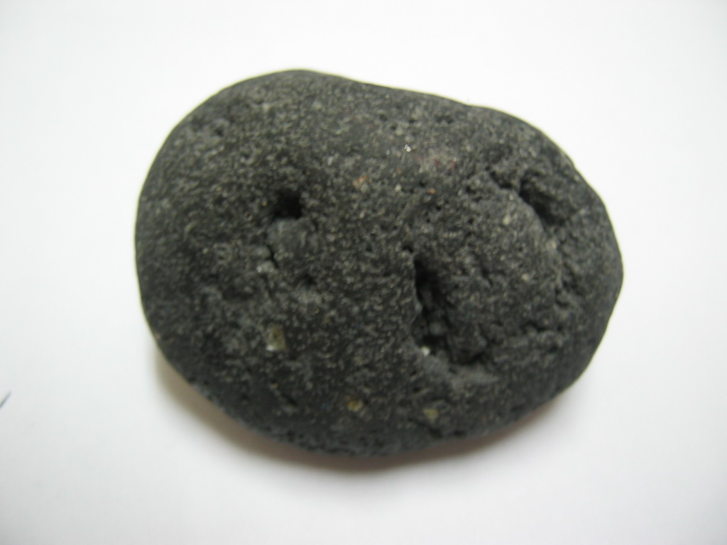 Roca volcánica del Teide (Islas Canarias)